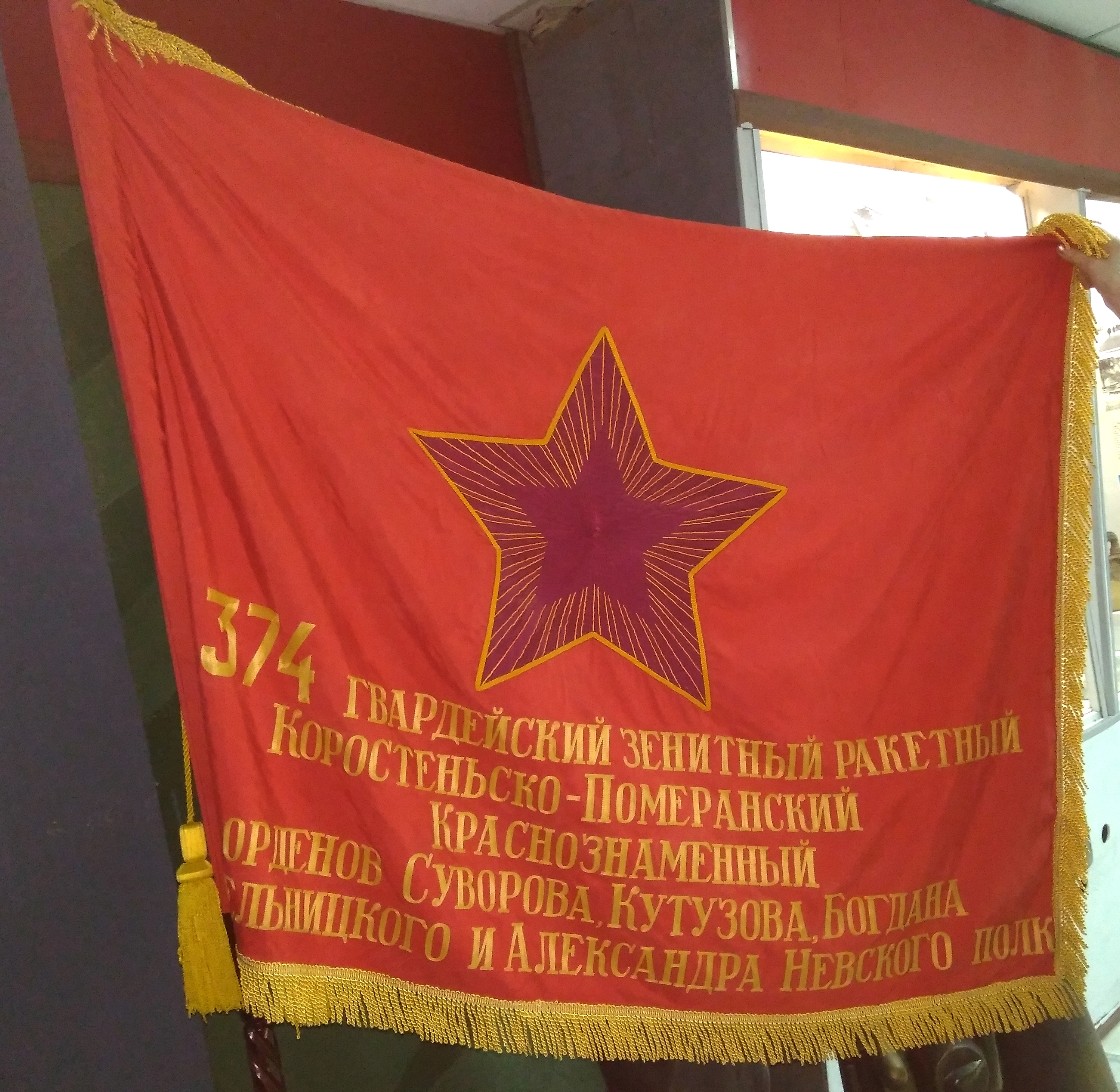 Боевое знамя 374 гвардейского зенитного ракетного полка в Военно-Историческом музее Дома Офицеров в Алматы